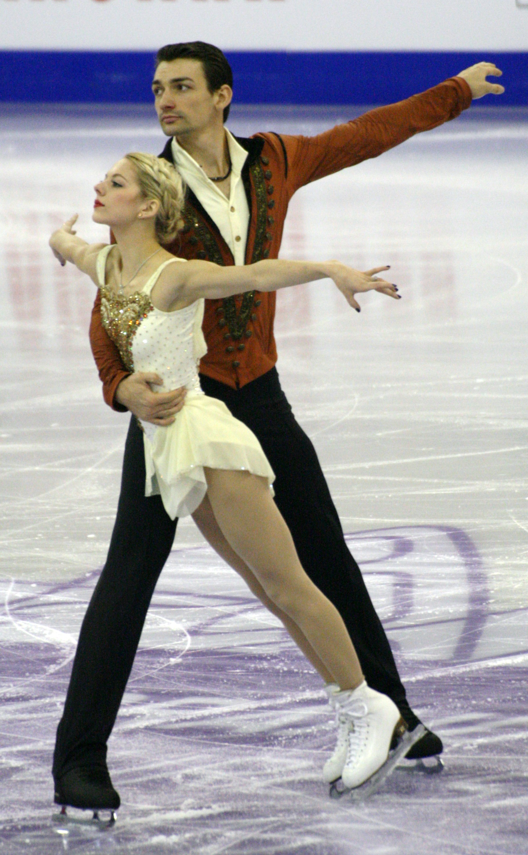 Алекса Шимека и Крис Книрем (США) на финале Гран-при по фигурному катанию 2015-2016.